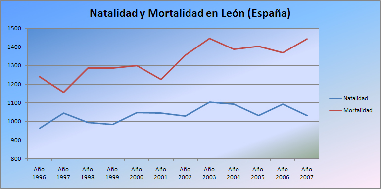 Gráfica de la evolución de la natalidad (línea azul) y la mortalidad (línea roja) en León (España).